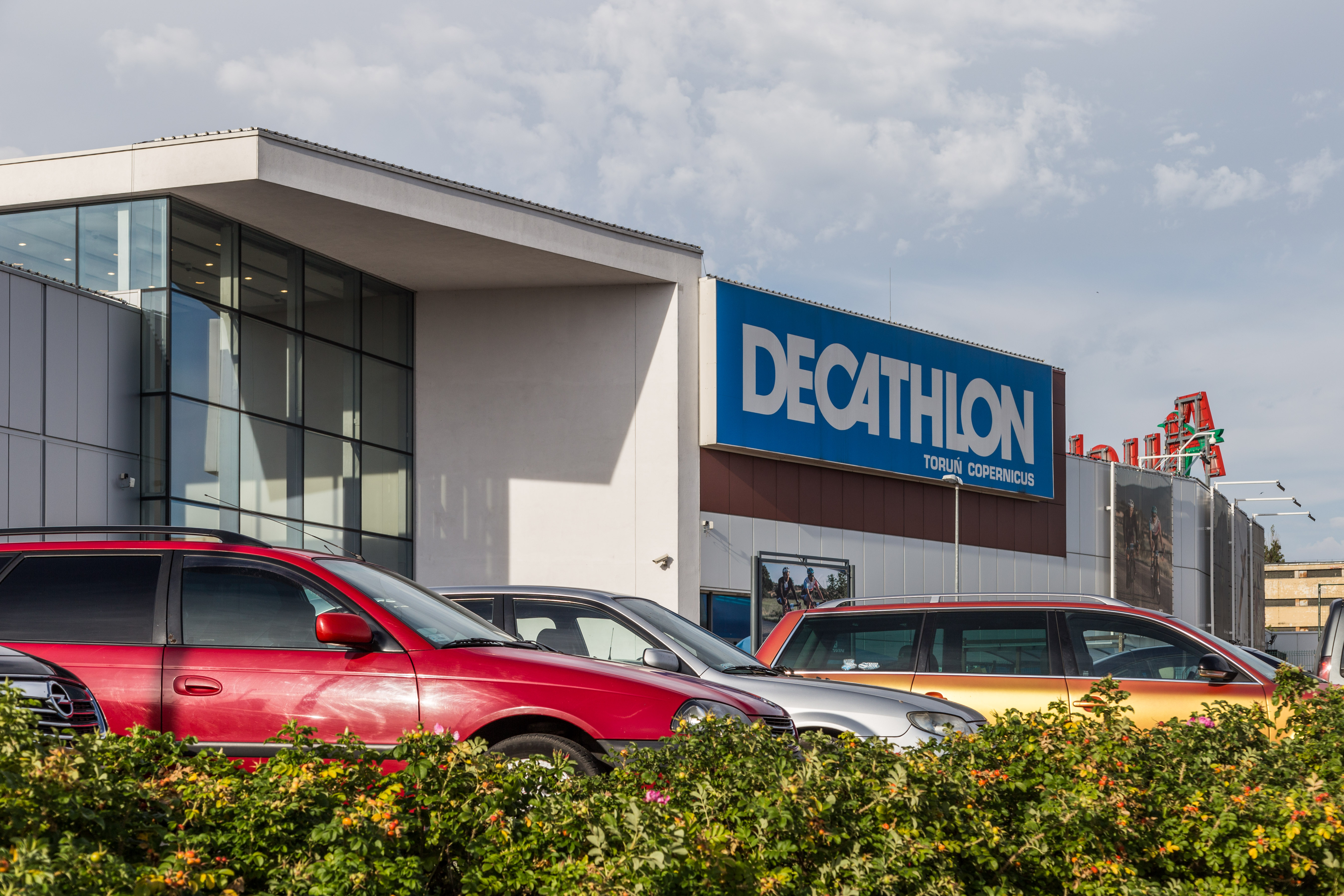 Toruń, sklep Decathlon w centrum handlowym Atrium Copernicus